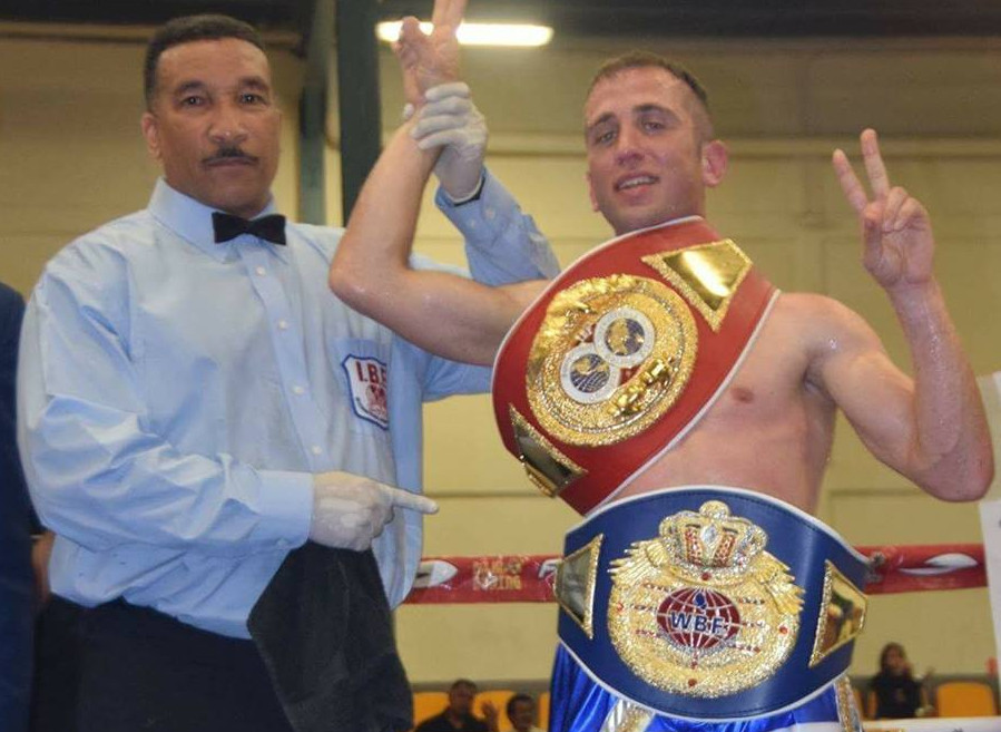 Mio marito viene proclamato campione del mondo di pugilato da Tony Weeks